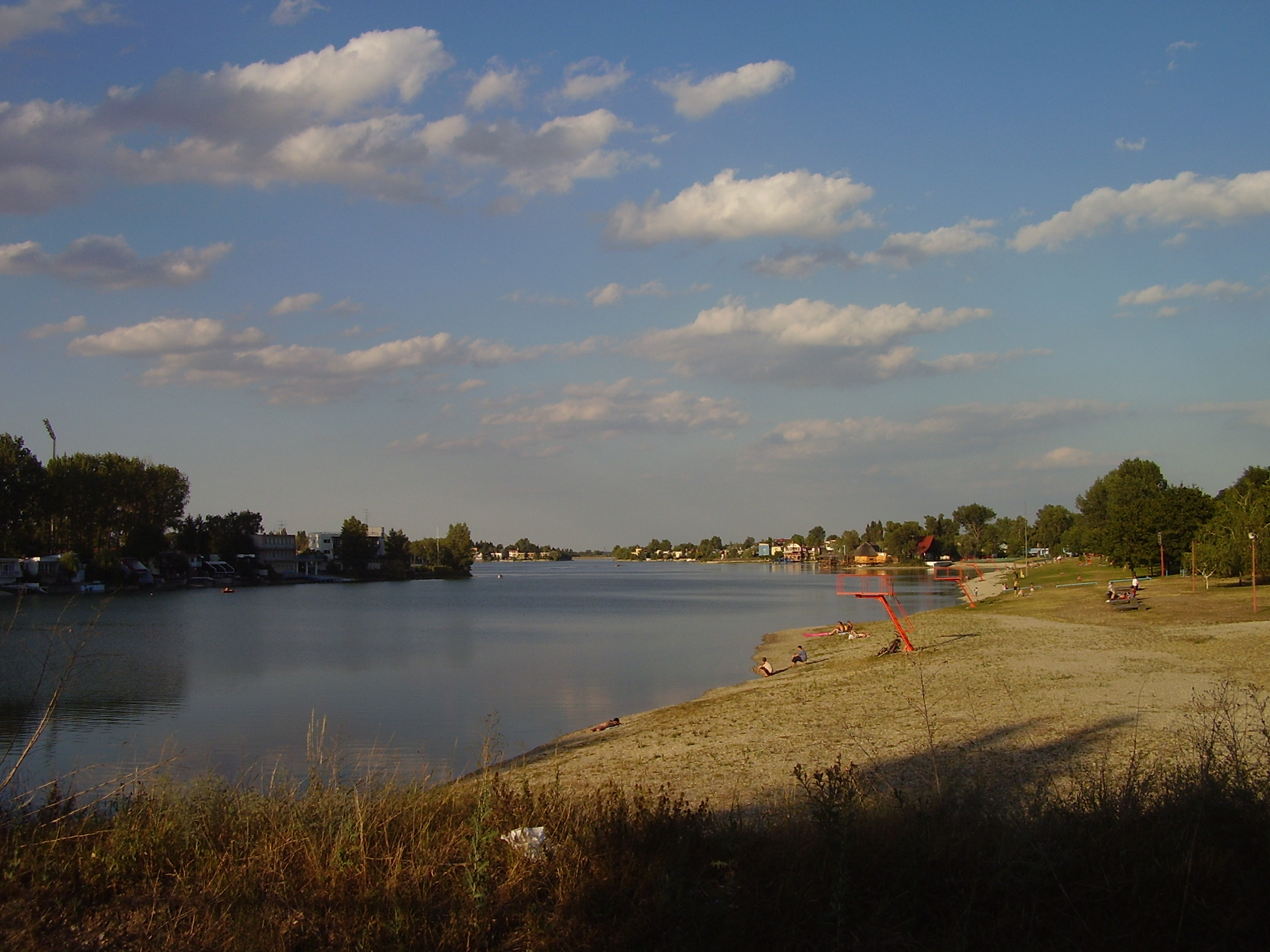 Senec